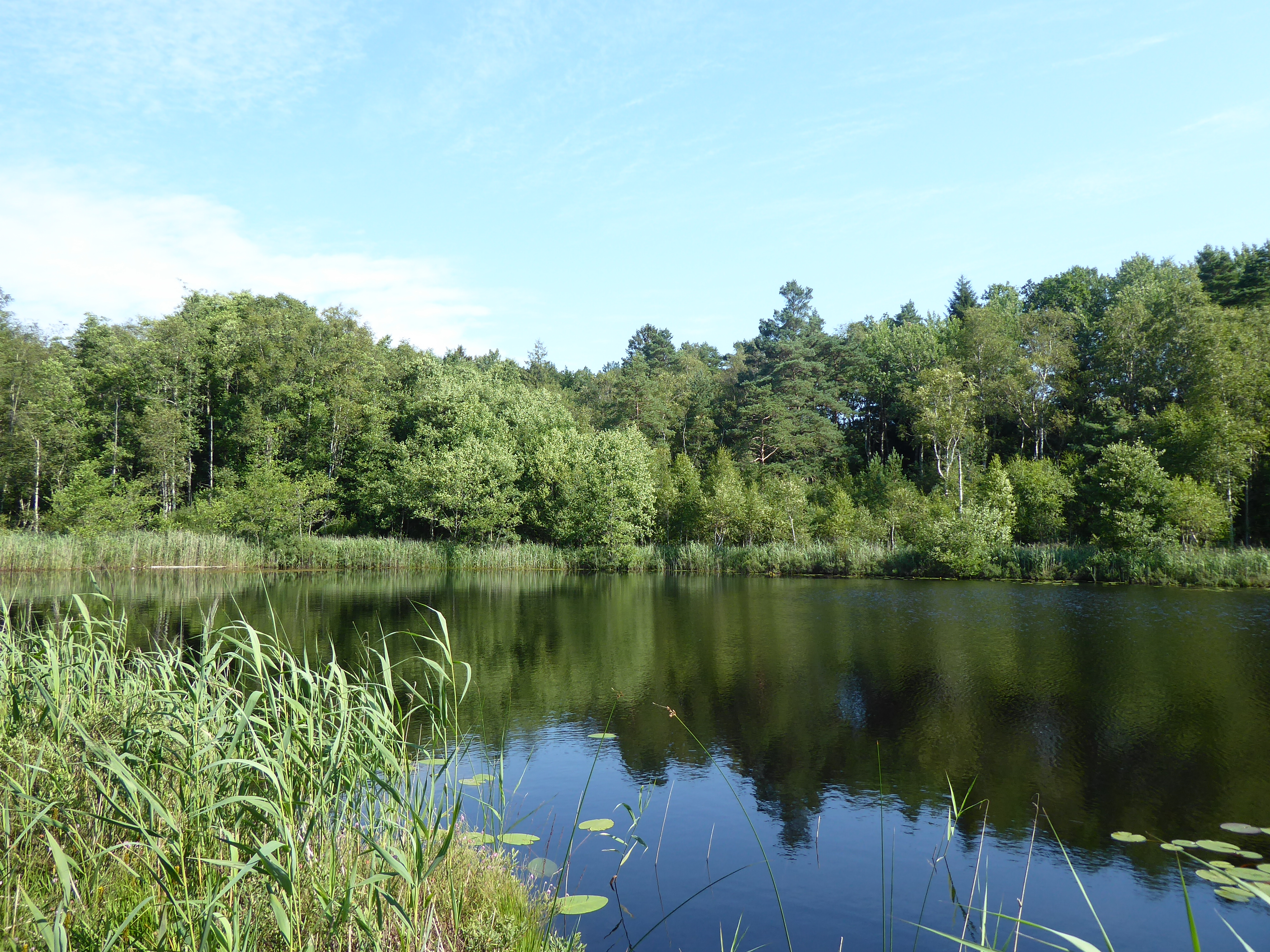 Lilla Brastjärnen (Västergötland, Sverige) från W den 7 augusti 2020.